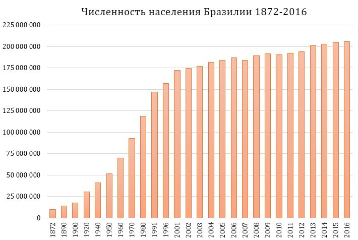 Население Бразилии 1872-2016